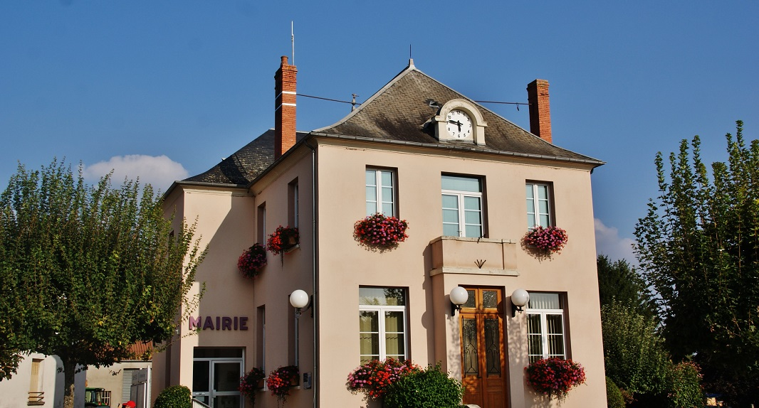 La Mairie